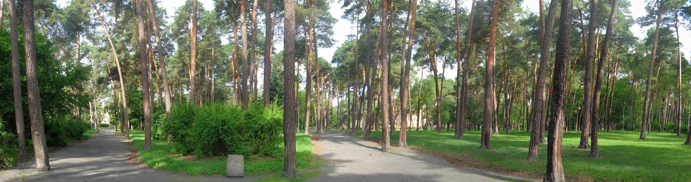 Park im. Zenona Załuskiego w Bydgoszczy